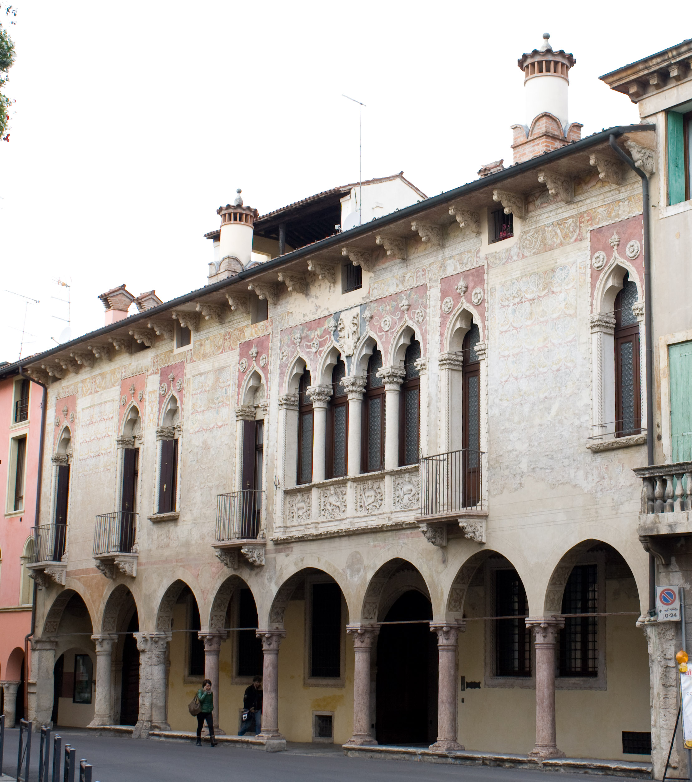 Vicenza, Palazzo Regaù (1400) in Borgo San Pietro